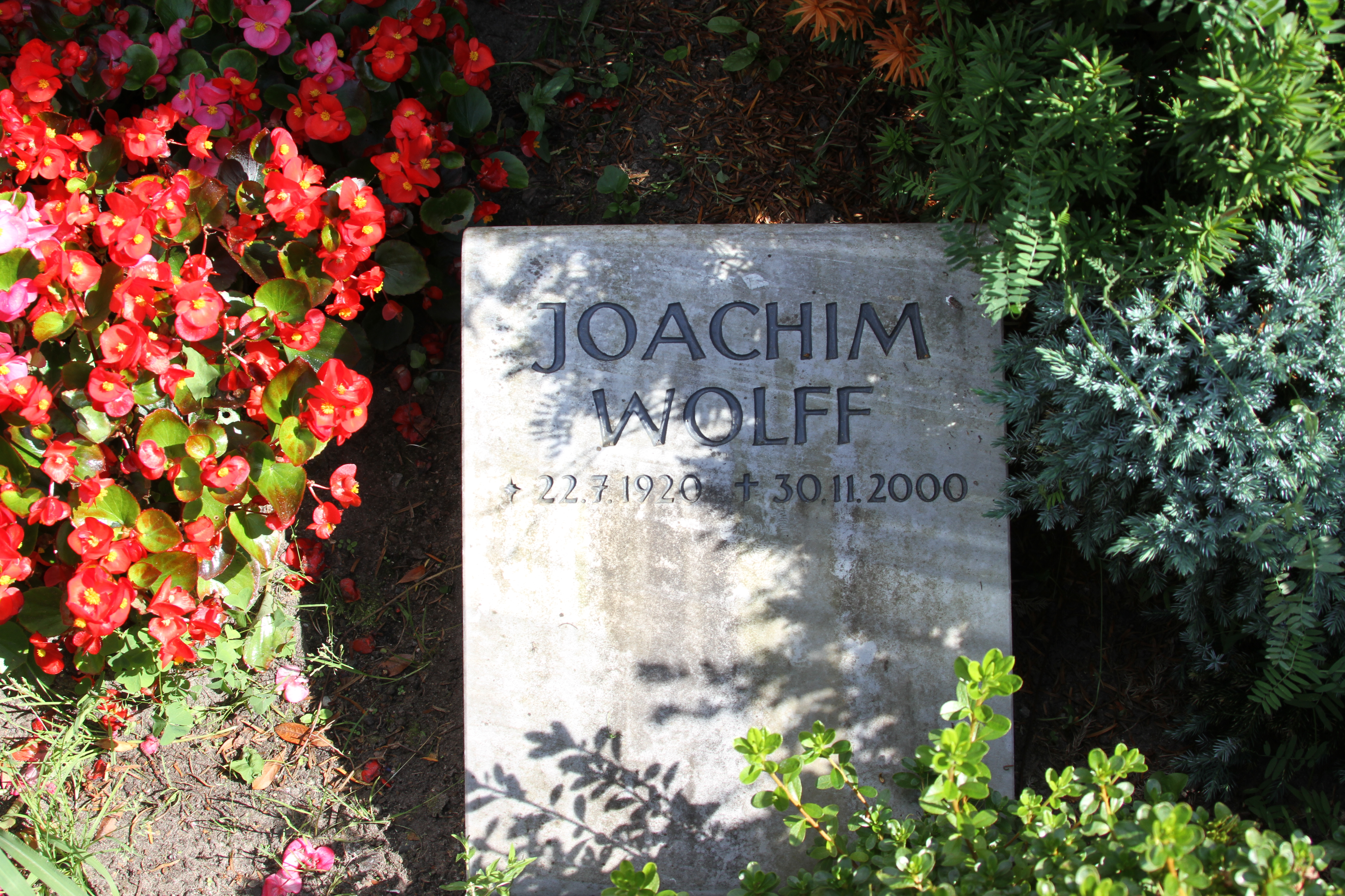 Joachim Wolff (* 22. Juli 1920 in Stargard in Pommern; † 30. November 2000) war ein deutscher Schauspieler und Sprecher.